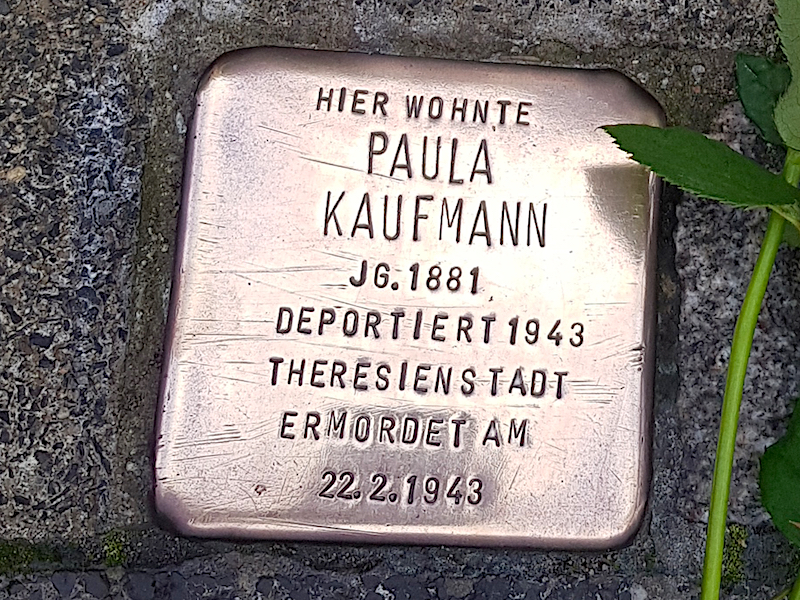 Stolperstein für Paula Kaufmann, Jg. 1881, deportiert 1943 ins KZ Theresienstadt, ermordet am 22.2.1943